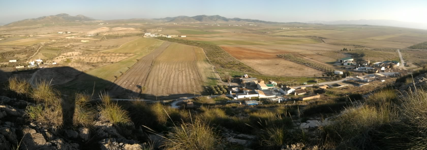 Panorámica de LA JAMULA